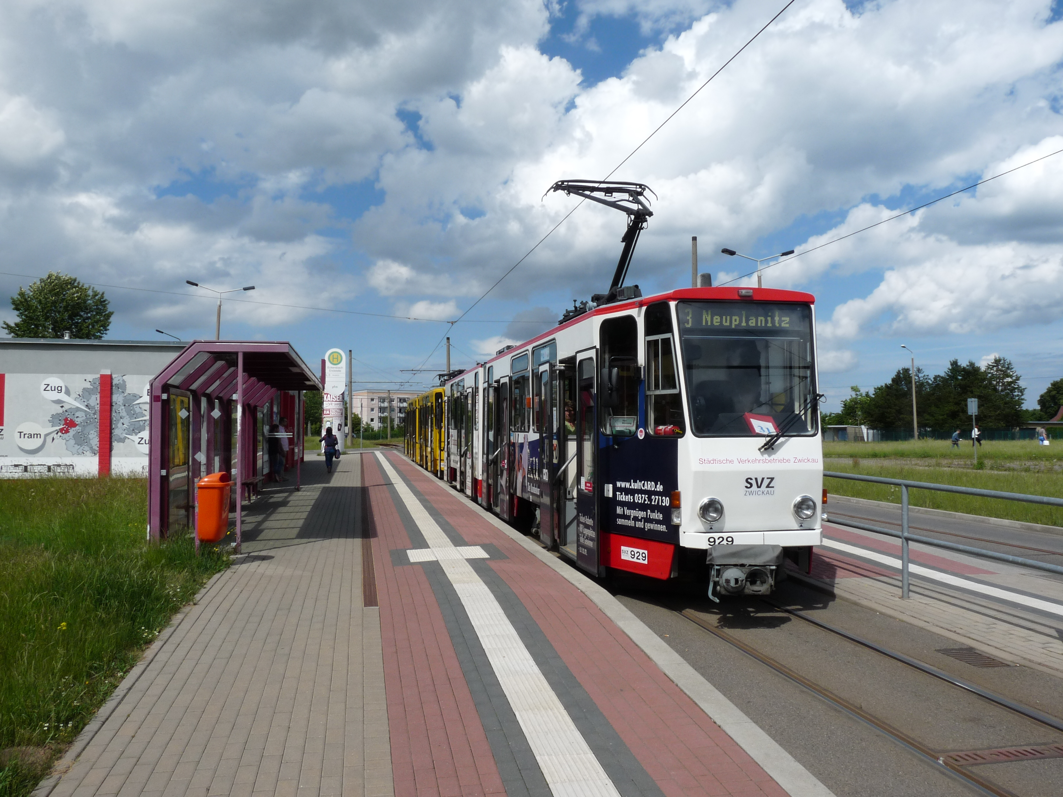 Zwickau tram